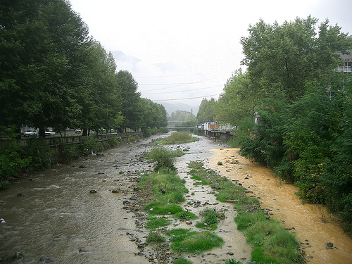 Voghdji River in Kapan